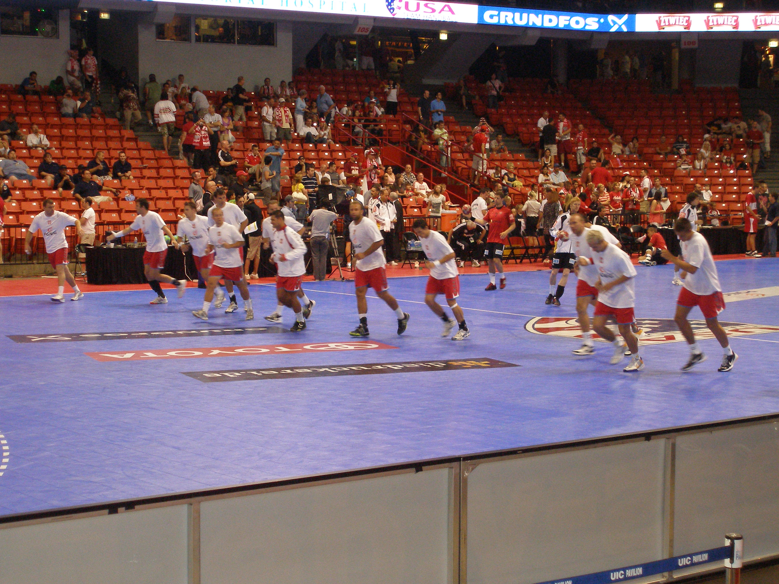 Jest to zdjęcie Polskiej reprezentacji w piłkę ręczną mężczyzn podczas rozgrzewki przed meczem Polska-Niemcy w Chicago.